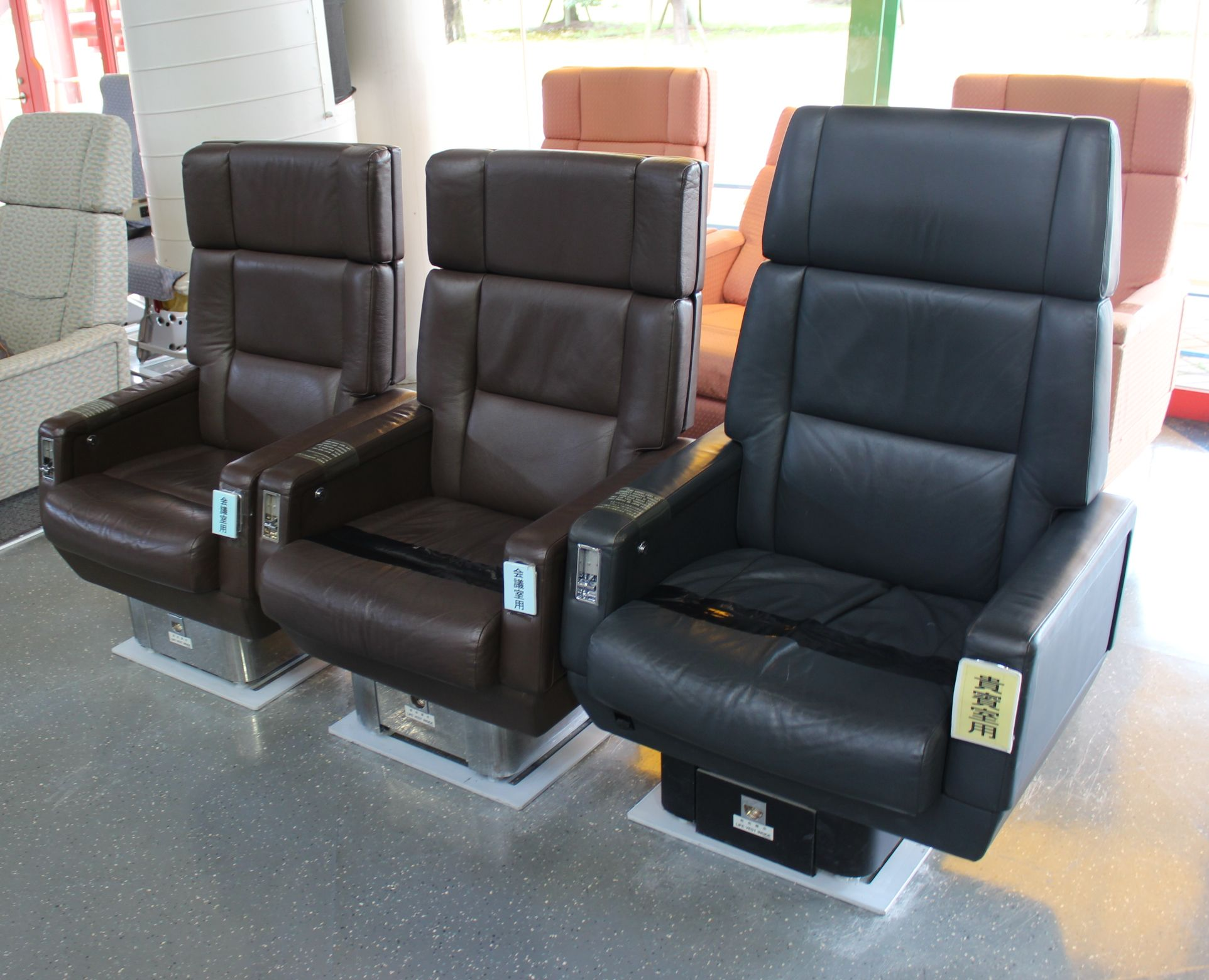 政府専用機 貴賓席